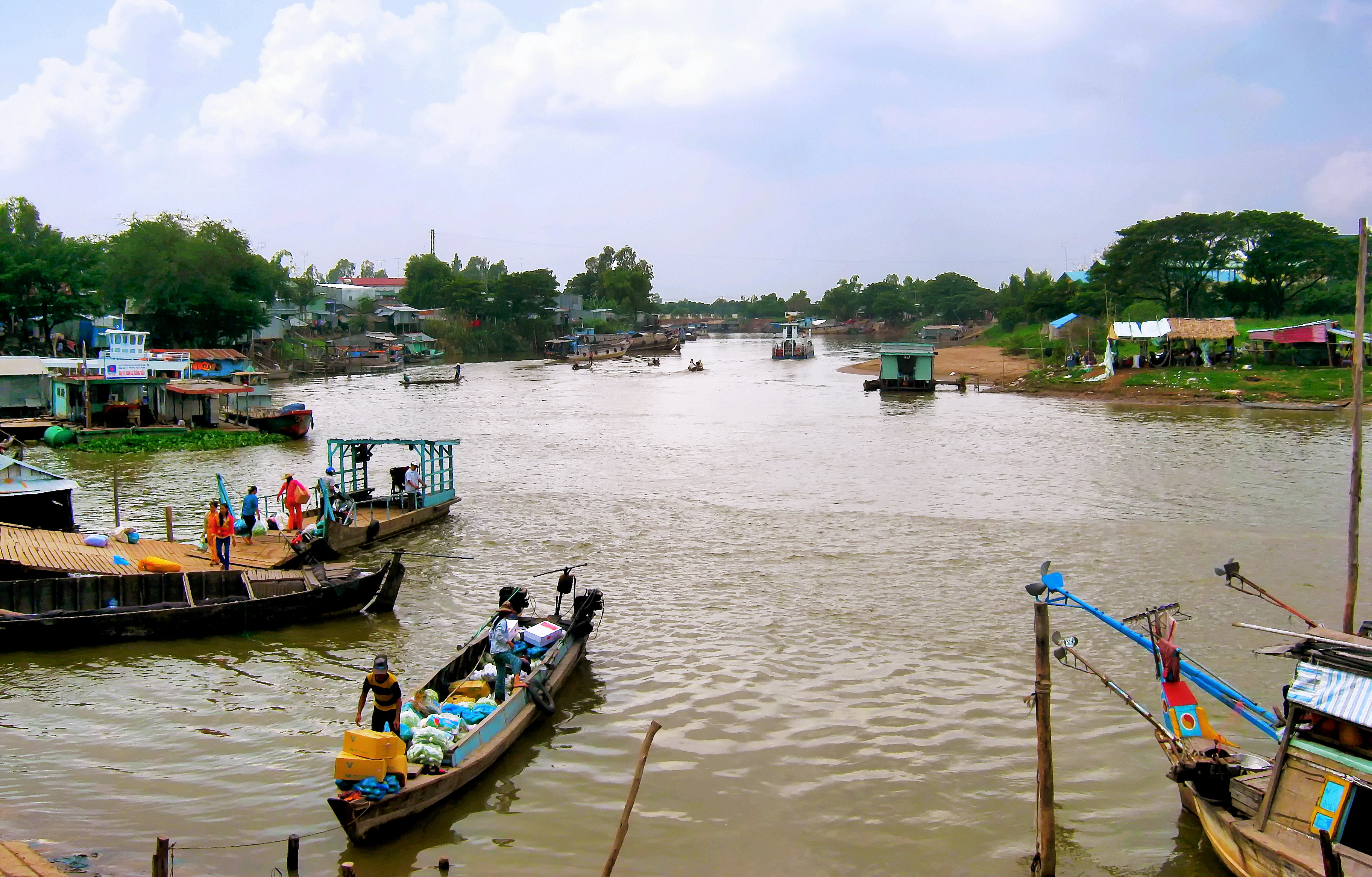 Sông Bình Di, đoạn chảy qua thị trấn Long Bình của huyện An Phú, An Giang, Việt Nam. Đến đây, con sông này trở thành biên giới tự nhiên giữa Việt Nam và Campuchia.